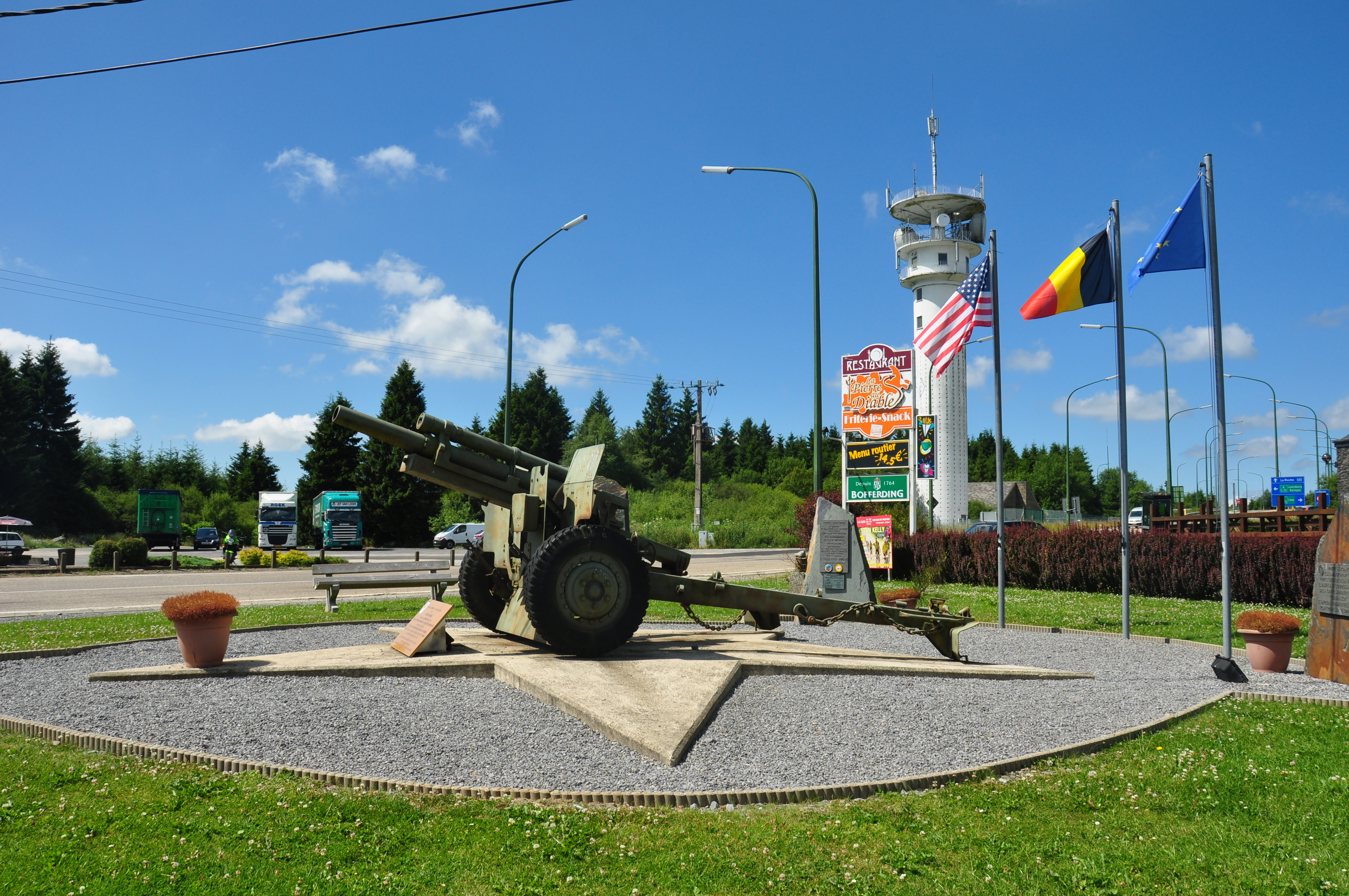 Stèles et canon en commémoration de la Seconde Guerre mondiale à la Baraque de Fraiture (Vielsalm, Belgique)